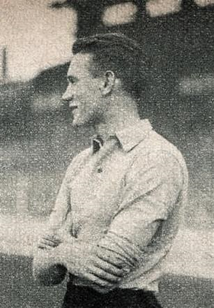 Jean Snella en novembre 1938.